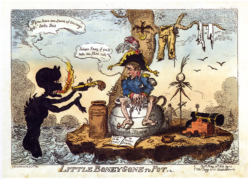 Napoleon sitzt auf einem Nachttopf („Kaiserlicher Thron“ in Anspielung auf das „Thrönchen“, auf der kleine Napoleon „Little Boney“ sitzt, wie ein Kind, wenn es Stuhlgang hat) auf der Insel Elba, auf die er 1814 verbannt wurde. Der Teufel reicht ihm eine Pistole und sagt: „Wenn Du noch ein Fünkchen Courage hast, nimm dieses“ und überreicht sie ihm zum Zwecke des Selbstmordes. Er antwortet: „Mach' ich vielleicht, wenn Du den Zünder entfernst". Das zu Füßen des Nachttopfes liegende Buch spielt auf die Krätze an, die Napoleon sich im Exil zuzog. Die Krähe anstelle des Kaiseradlers und die alte Kanone symbolisieren den Verfall der Macht. Außerdem sieht man links neben dem Thron das sprichwörtliche Pulverfass und auf der rechten Seite eine Vogelscheuche mit einem Schwert. Text : " If you have one spark of courage left, take this." / "Perhaps I may if you'll take the flint out." (en français : "S'il vous reste une étincelle de courage, prenez ceci" / "Peut-être, si vous retirez le silex").